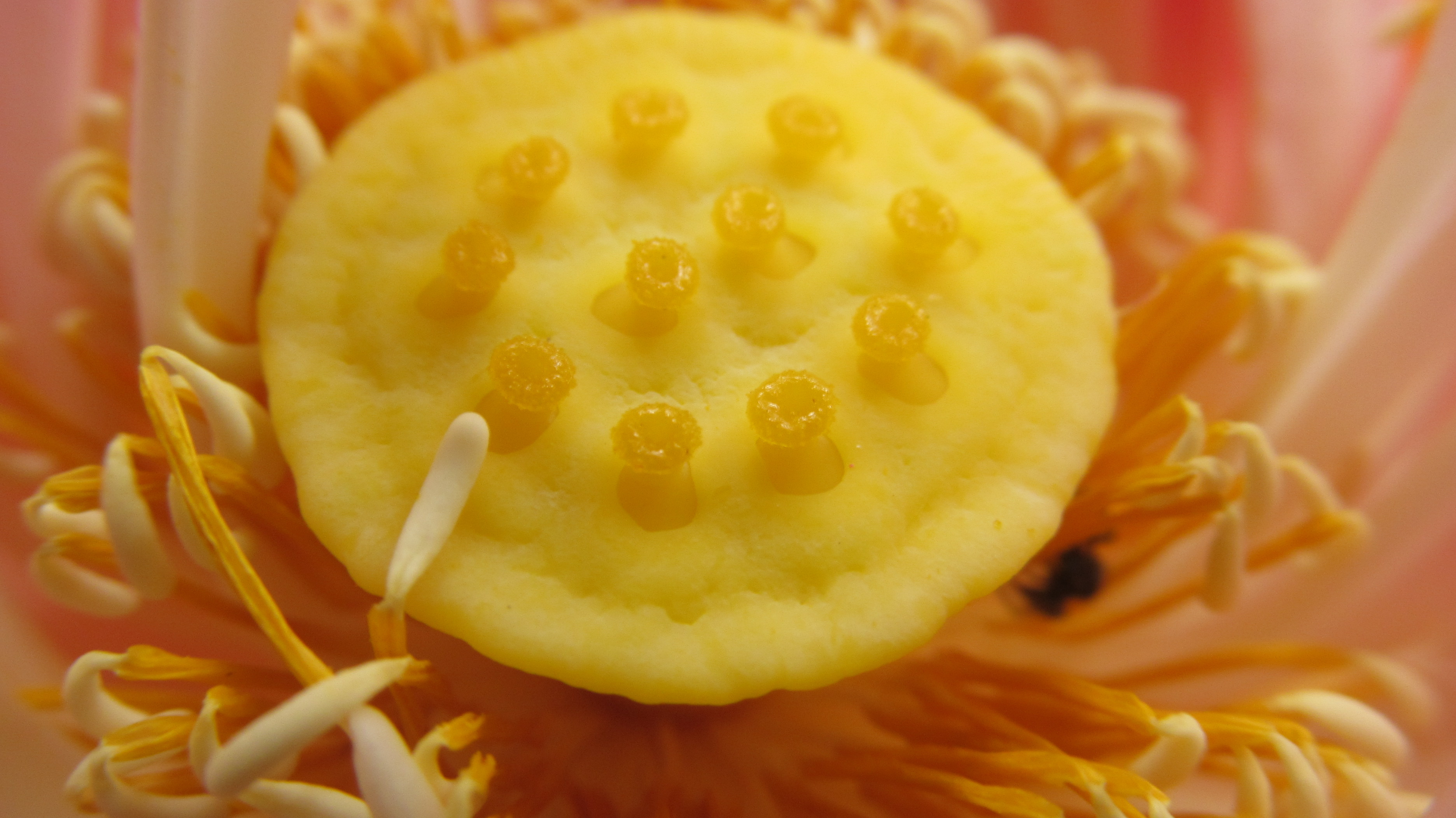 താമരയുടെ കേന്ദ്രഭാഗം. തേനീച്ചകളെയും കാണാം.